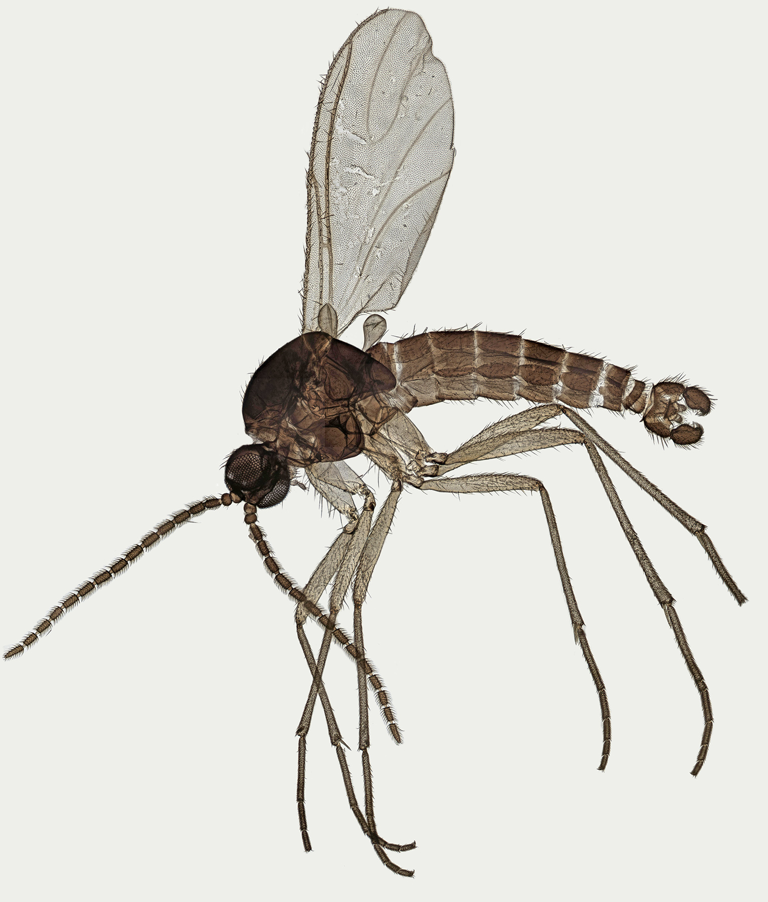 image description